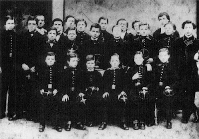 Arthur Rimbaud e altri allievi dell'Istituto Rossat di Charleville nel 1864